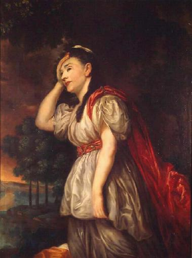 Esther Charlotte Brandes (1742 Groß-Rosinko - 1786 Hamburg) as "Ariadne", (variierte Kopie eines Gemäldes von Rollenportrait), Öl auf Leinwand, doubliert